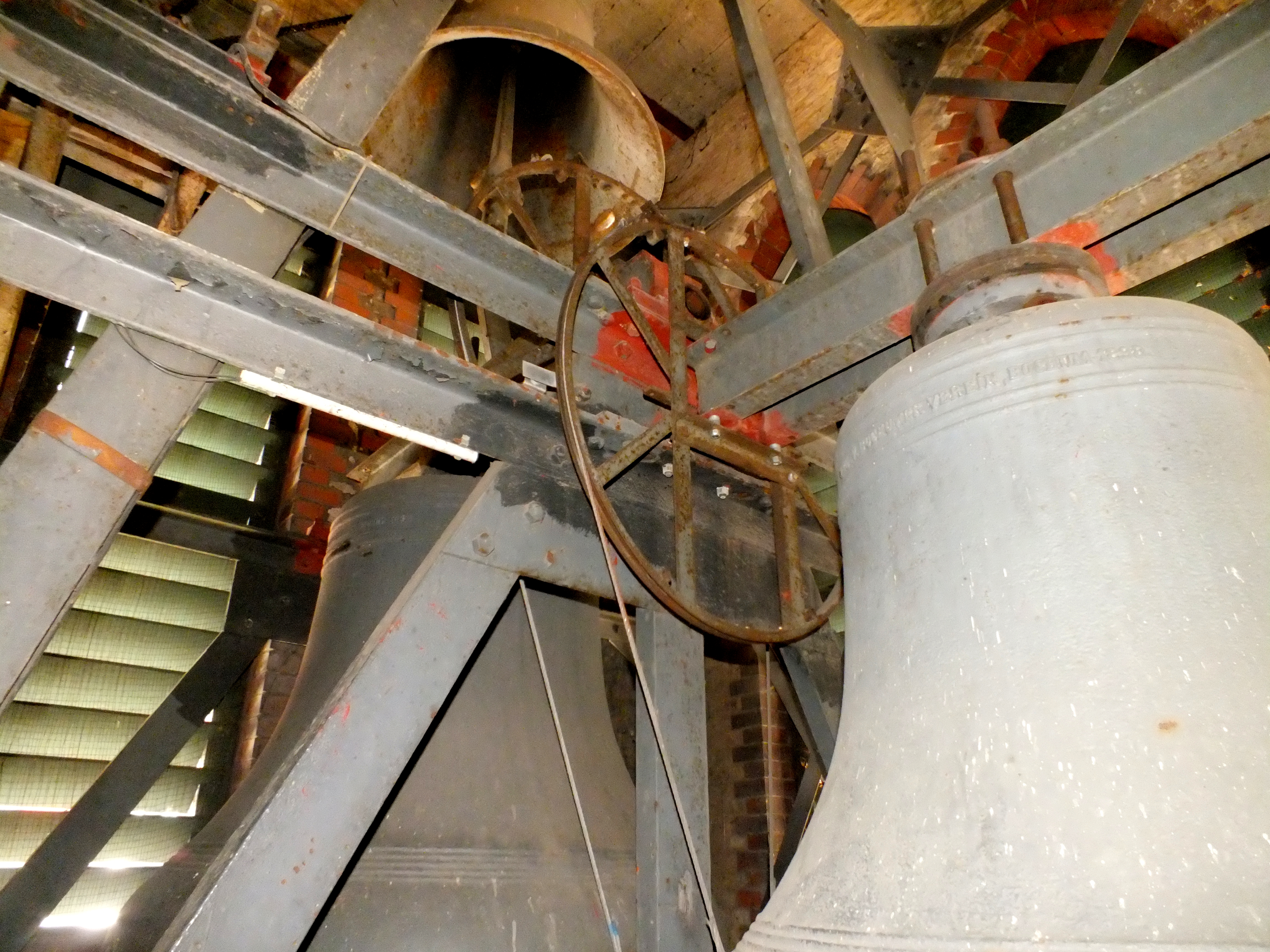 Berlin-Köpenick, Lindenstraße: Kathol. Kirche St. Josef; alle drei Glocken